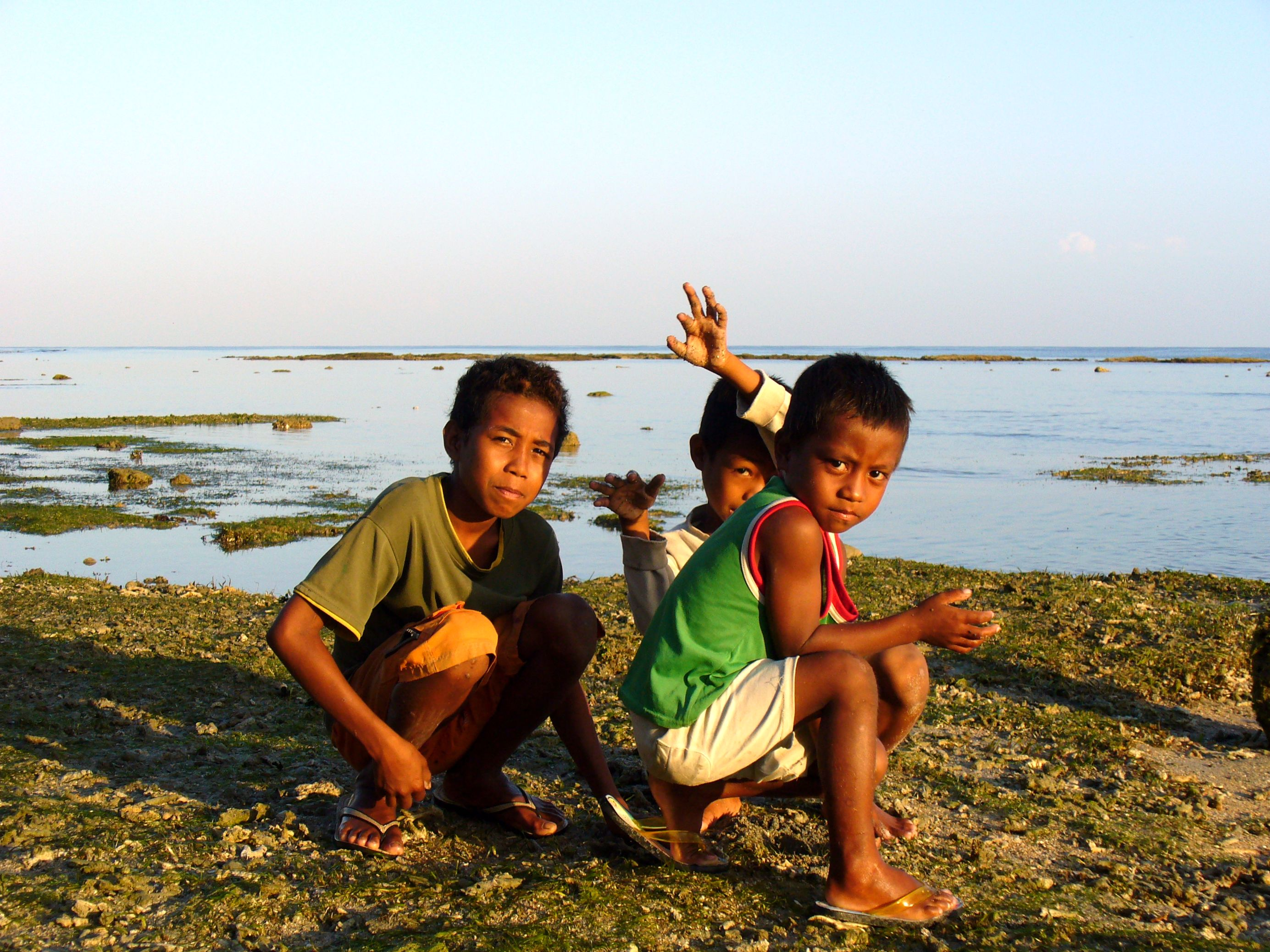 Pantai Wataboo, Osolata, East Timor